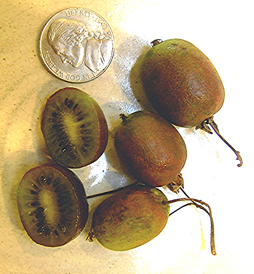 Kiwifruit